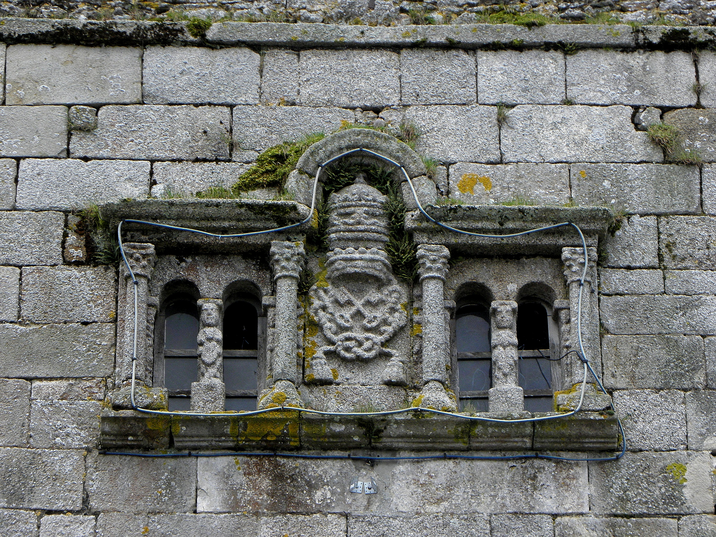 Église Saint-Pierre d'Hardanges (53). Détail sculpté de la tour. Façade occidentale.